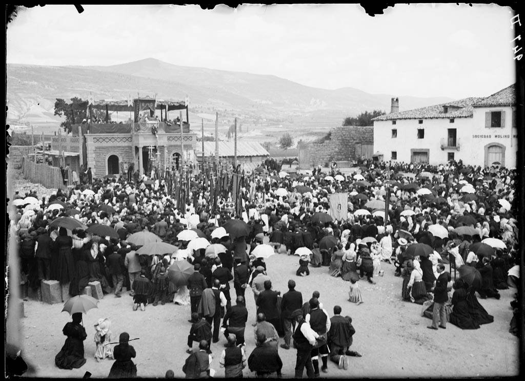 Imatge